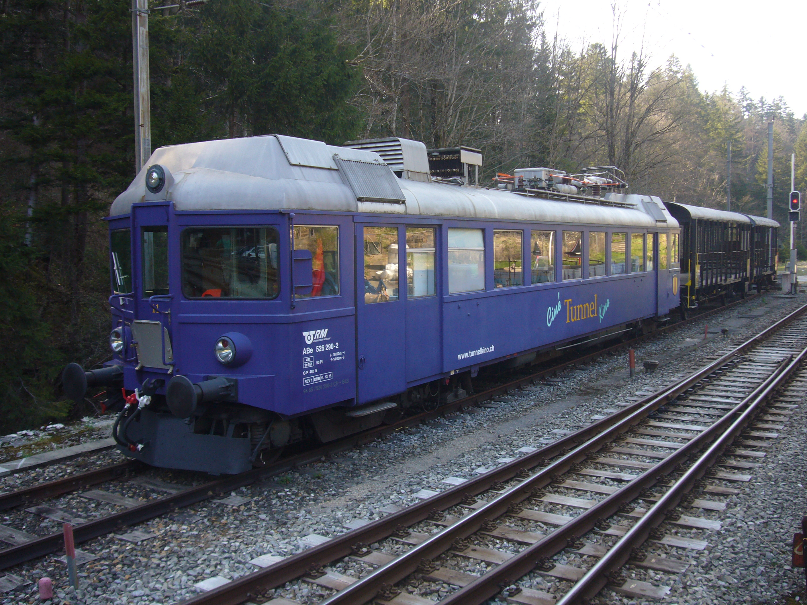 Auf dem Bahnhof von Gänsbrunnen steht der Triebwagen ABe 526 290-2, ehemals SOB Triebwagen CFZe 4/4 Nr. 11 aus dem Jahr 1940 und seit 2001 für das Tunnelkino im Einsatz